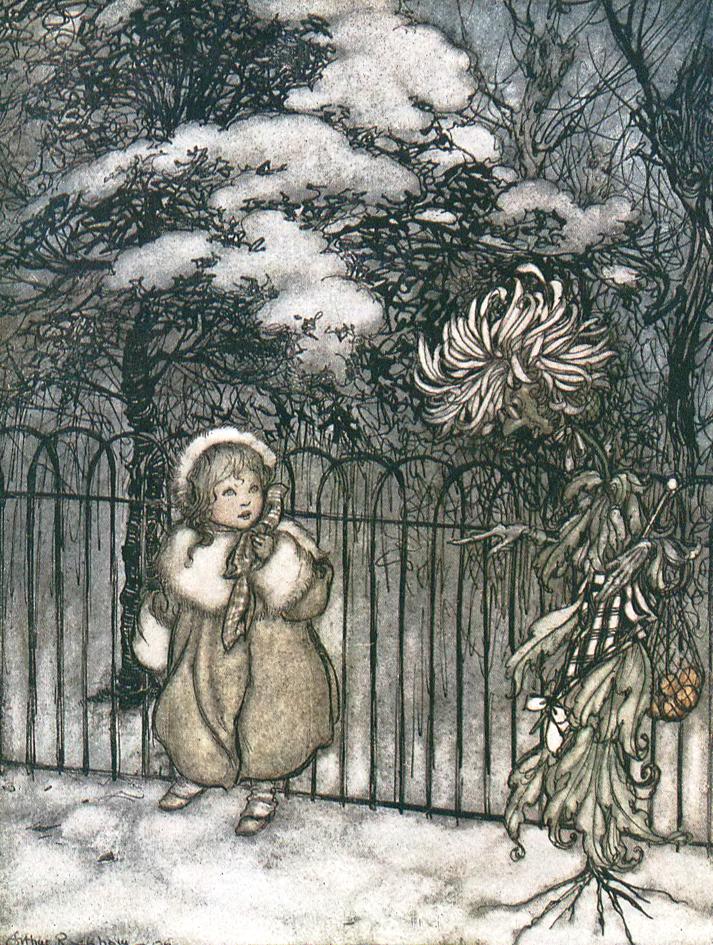 grafika z książki PL "Przygody Piotrusia Pana" publikacja Wydawnictwo J. Mortkowicza Warszawa 1914